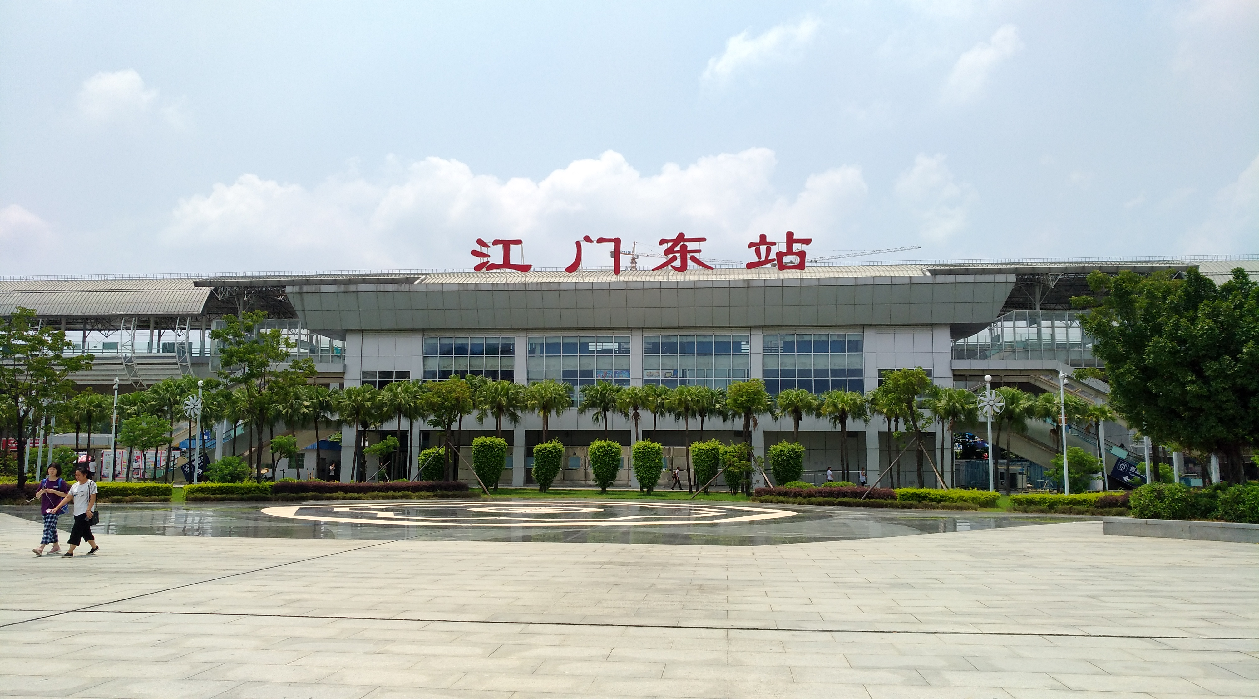 中国铁路 江门东站 站房